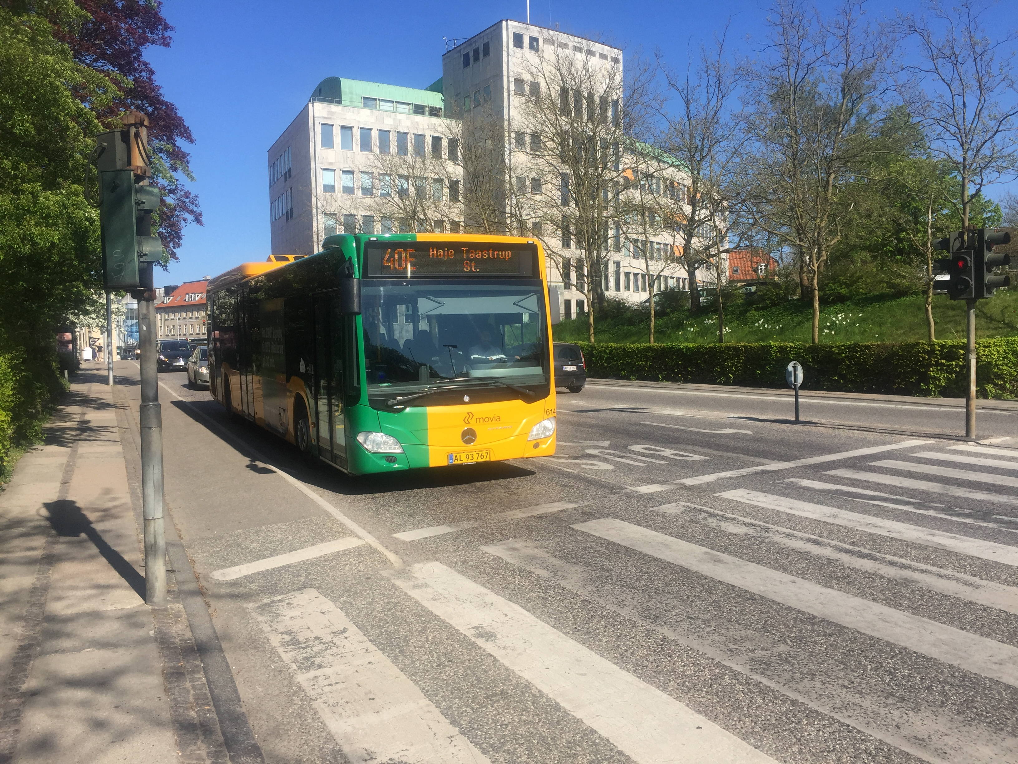 Movias buslinje 40E på Lyngby Torv, Kgs. Lyngby.